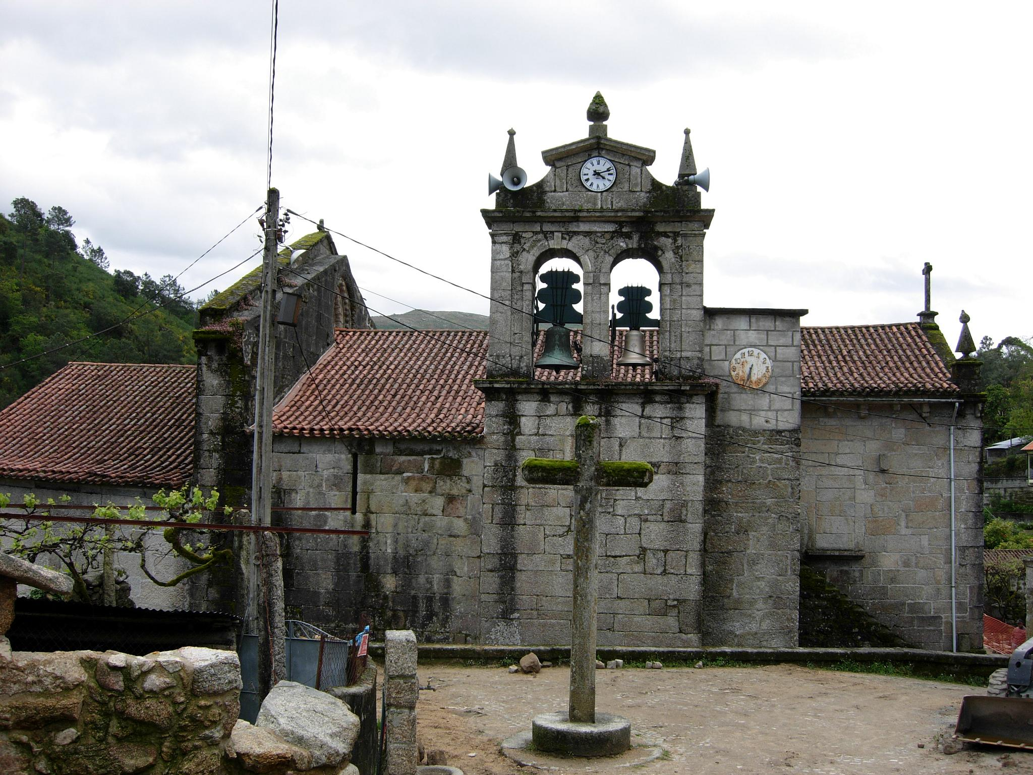 Antiguo monasterio benedictino, que fue fundado por la reina Doña Teresa. A principios del siglo XII adopta la reforma cisterciense, pasando a depender del monasterio de Santa Maria de Fiães en el siglo XIII. Localizada em Ermelo, Arcos de Valdevez, Viana do Castelo , Portugal.